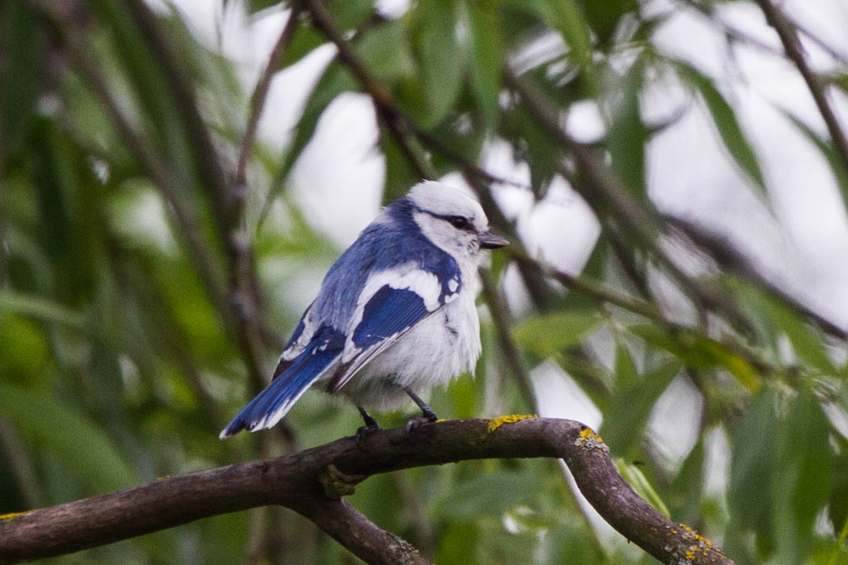 Sýkora azurová